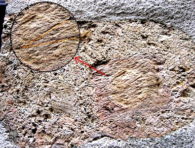 Photo de cônes de percussion prise sur une façade d'un mur d'une maison de Rochechouart (Haute Vienne, France), effet de l'impact météoritique qui frappa la région il y a 214 millions d'années. Contents 1 Auteur 2 Licensing 3 Licensing 4 Original upload log Auteur Photo personnelle de Frédéric, 2004. Licensing Photo personnelle par --Frédéric 24 mai 2006 à 17:22 (CEST)